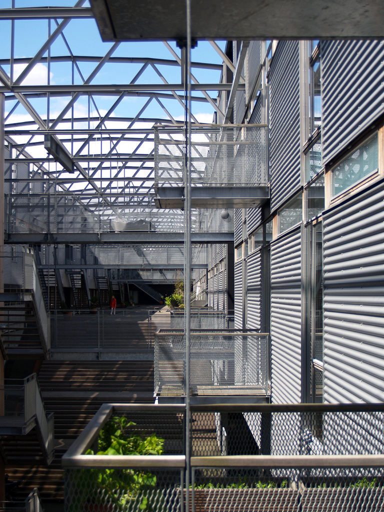 Torpedohallen, Holmen, København.